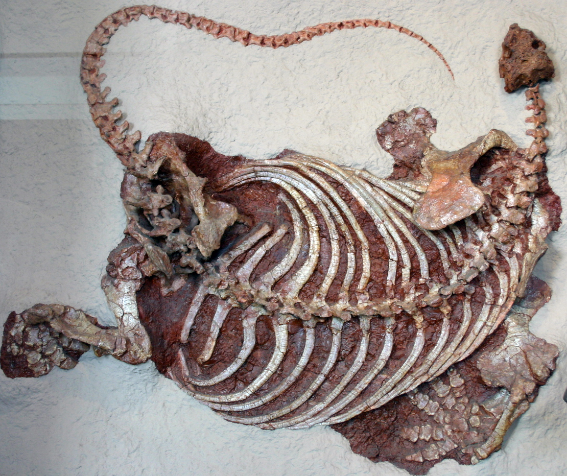 cup snout